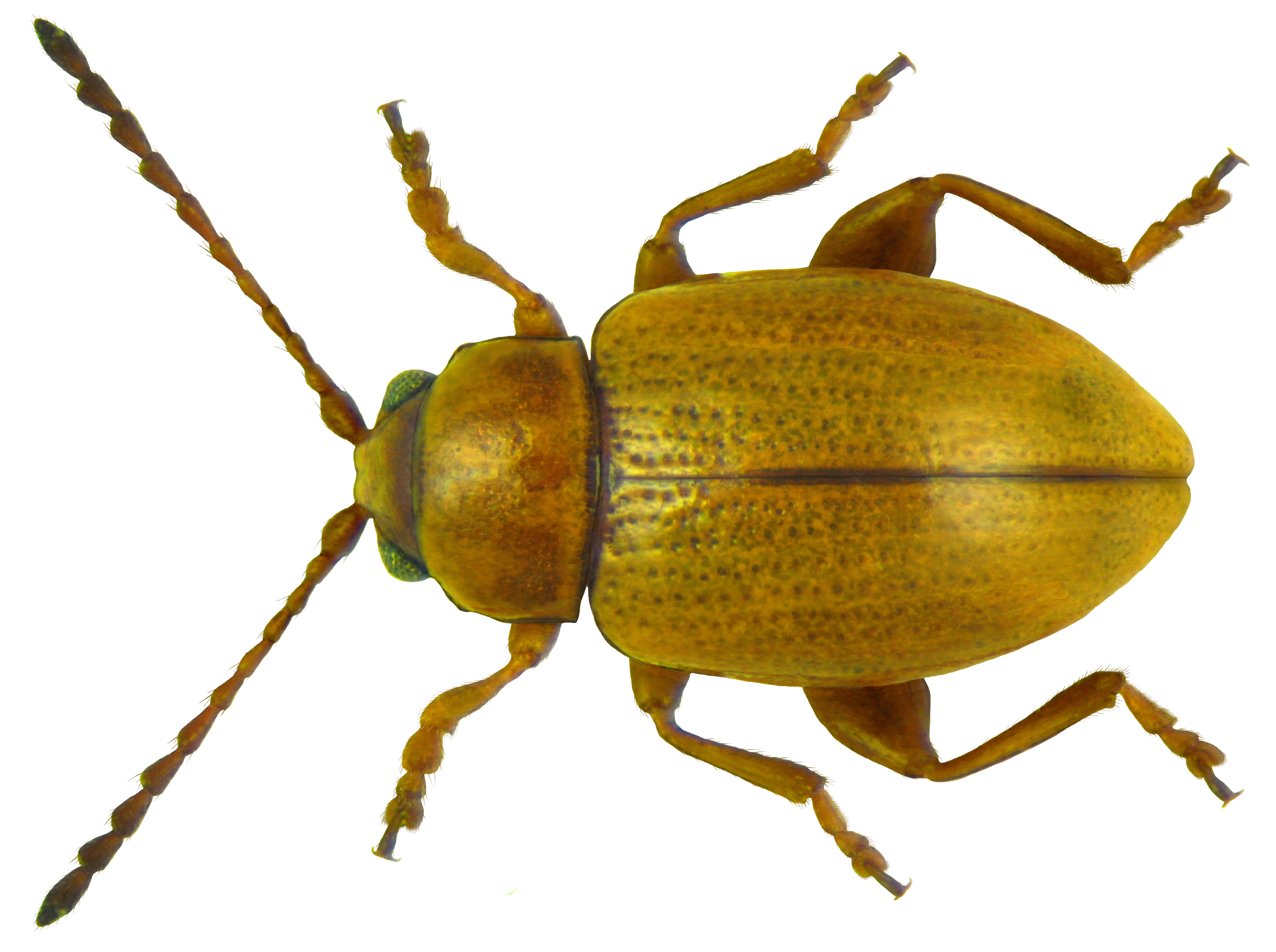 Lythraria salicariae (Paykull, 1800) Familie: Chrysomelidae Groesse: 2,2 mm Verbreitung: Europa Oekologie: auf Lysimachia-Arten an feuchten Orten Fundort: Germania, Bayern, Oberfranken, Kulmbach. Lindau leg. det. U.Schmidt, 1975 Photo: U.Schmidt, 2011